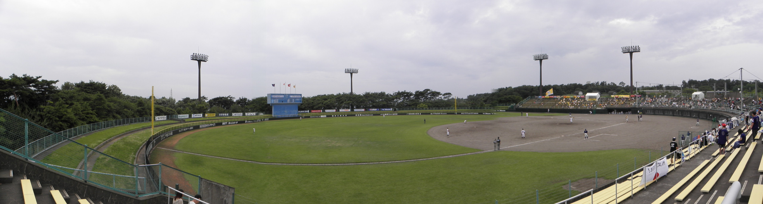 三国運動公園野球場(福井県坂井市)